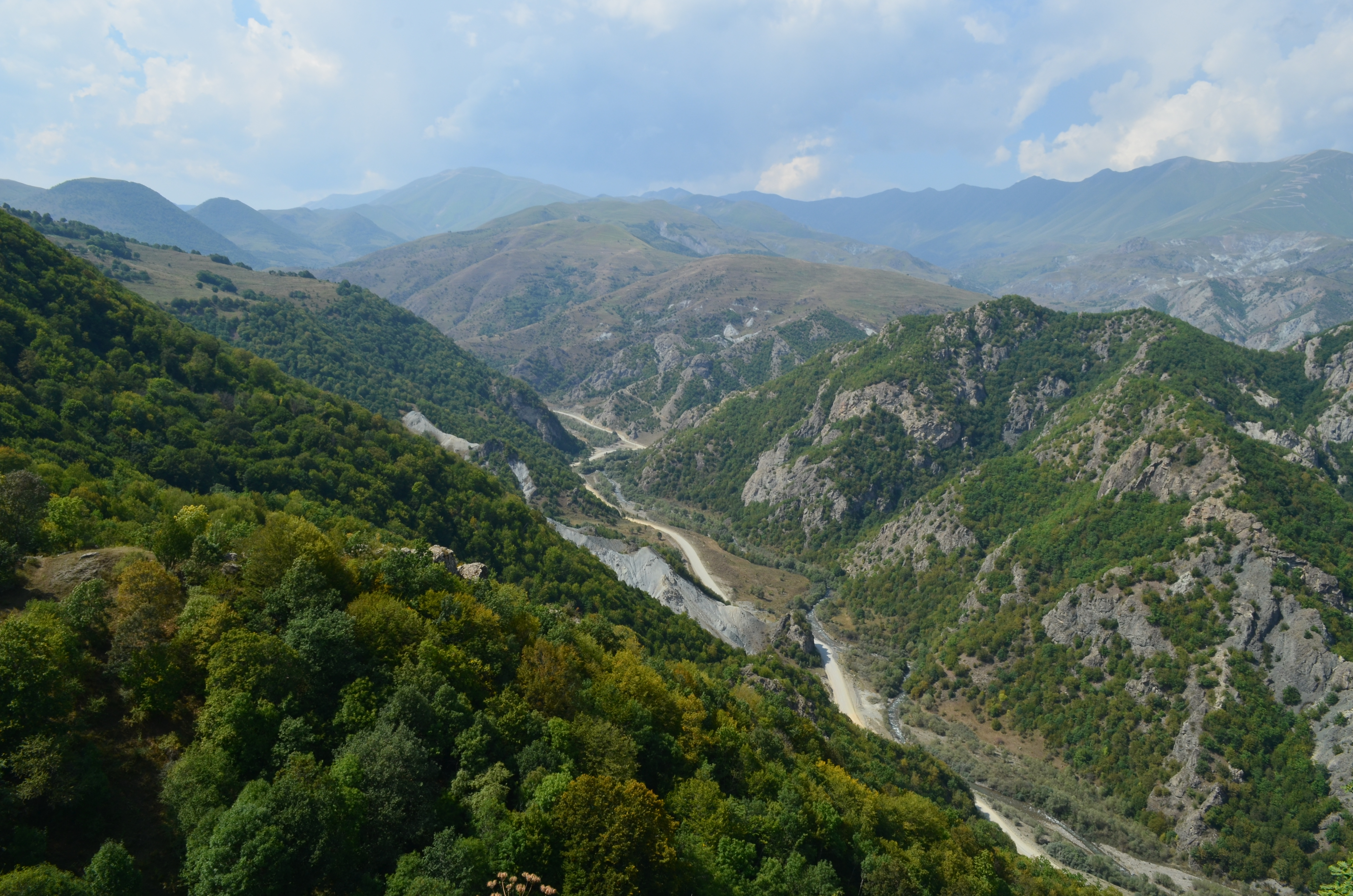 «Լևի» կիրճ